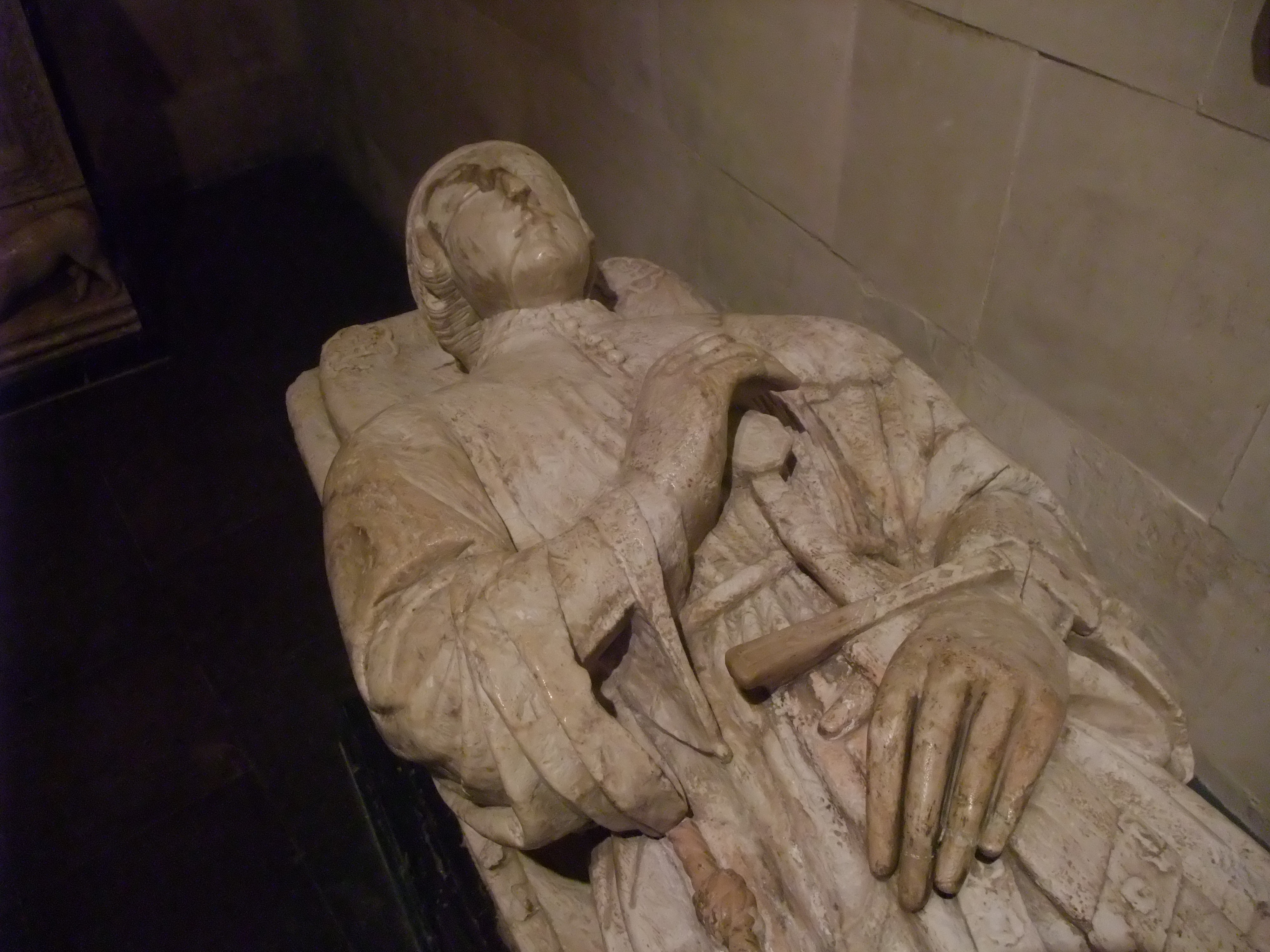 Barcelona-Museo Frederic Marés (III)-Sepulcro de Pedro Suárez I